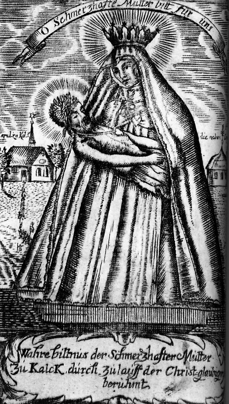 Köln-Kalk-Gnadenbild